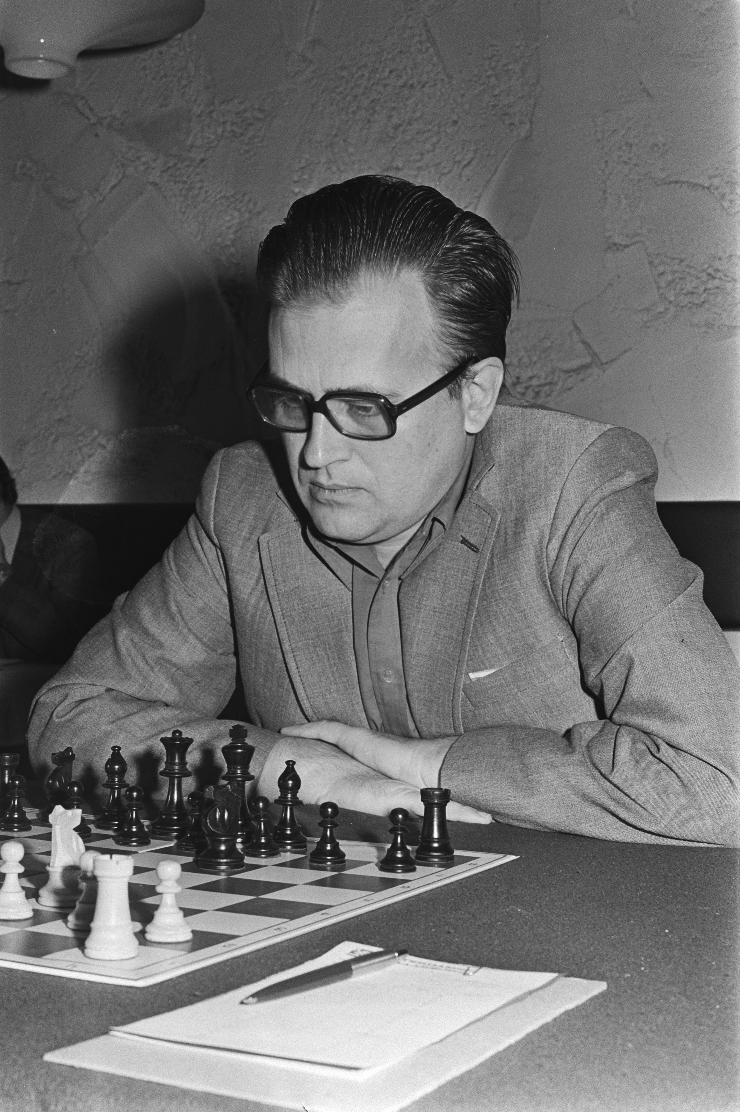 Collectie / Archief : Fotocollectie Anefo Reportage / Serie : Tweekamp Larsen tegen Portisch in De Doelen te Rotterdam Beschrijving : De Deen Larsen Datum : 28 februari 1977 Locatie : Rotterdam, Zuid-Holland Trefwoorden : portretten, schaken, schakers, wedstrijden Persoonsnaam : Larsen, Bent Fotograaf : Peters, Hans / Anefo Auteursrechthebbende : Nationaal Archief Materiaalsoort : Negatief (zwart/wit) Nummer archiefinventaris : bekijk toegang 2.24.01.05 Bestanddeelnummer : 929-0503